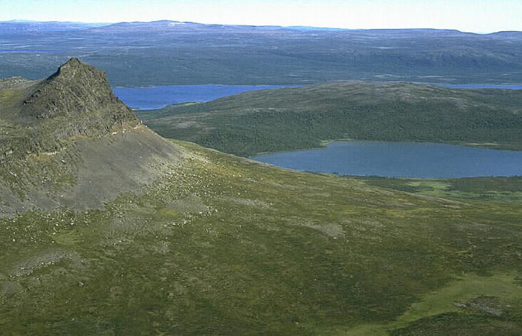 Motiv: Läffa Nyckelord: Flygbilder, Riksintressen Kategori: Fjällbygd Läffa